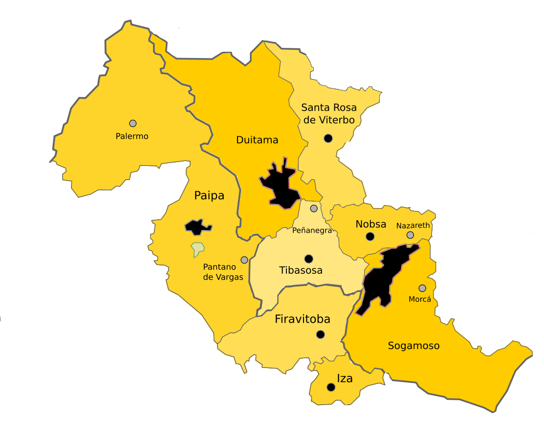 Map Of Metropolitan Area of Boyacá